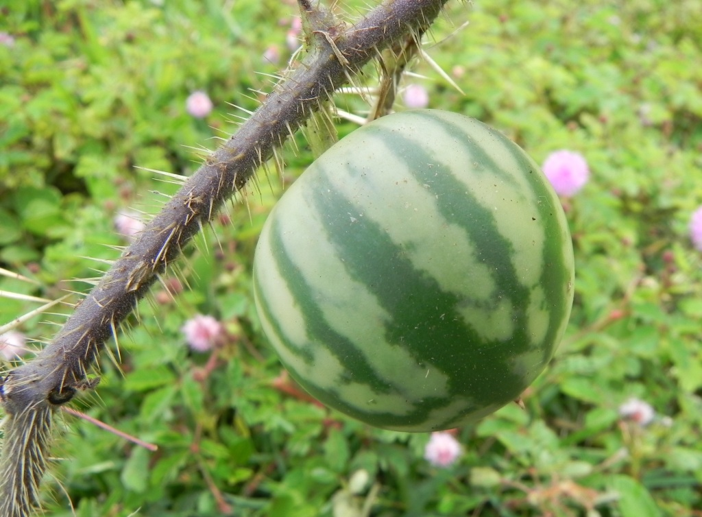 Solanum palinacanthum - SOLANACEAE SQN 311 - Brasília - Distrito Federal - Brasil.